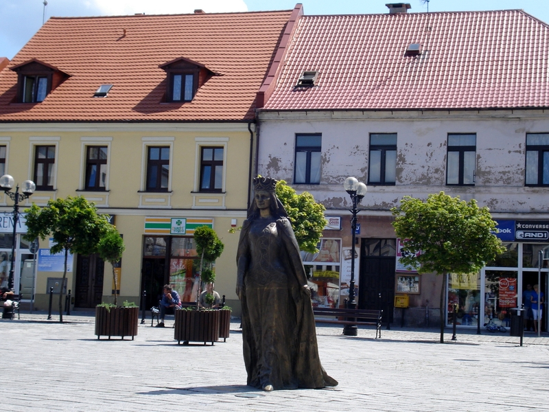 Inowrocław - Rynek rzezba Krolowej Jadwigi